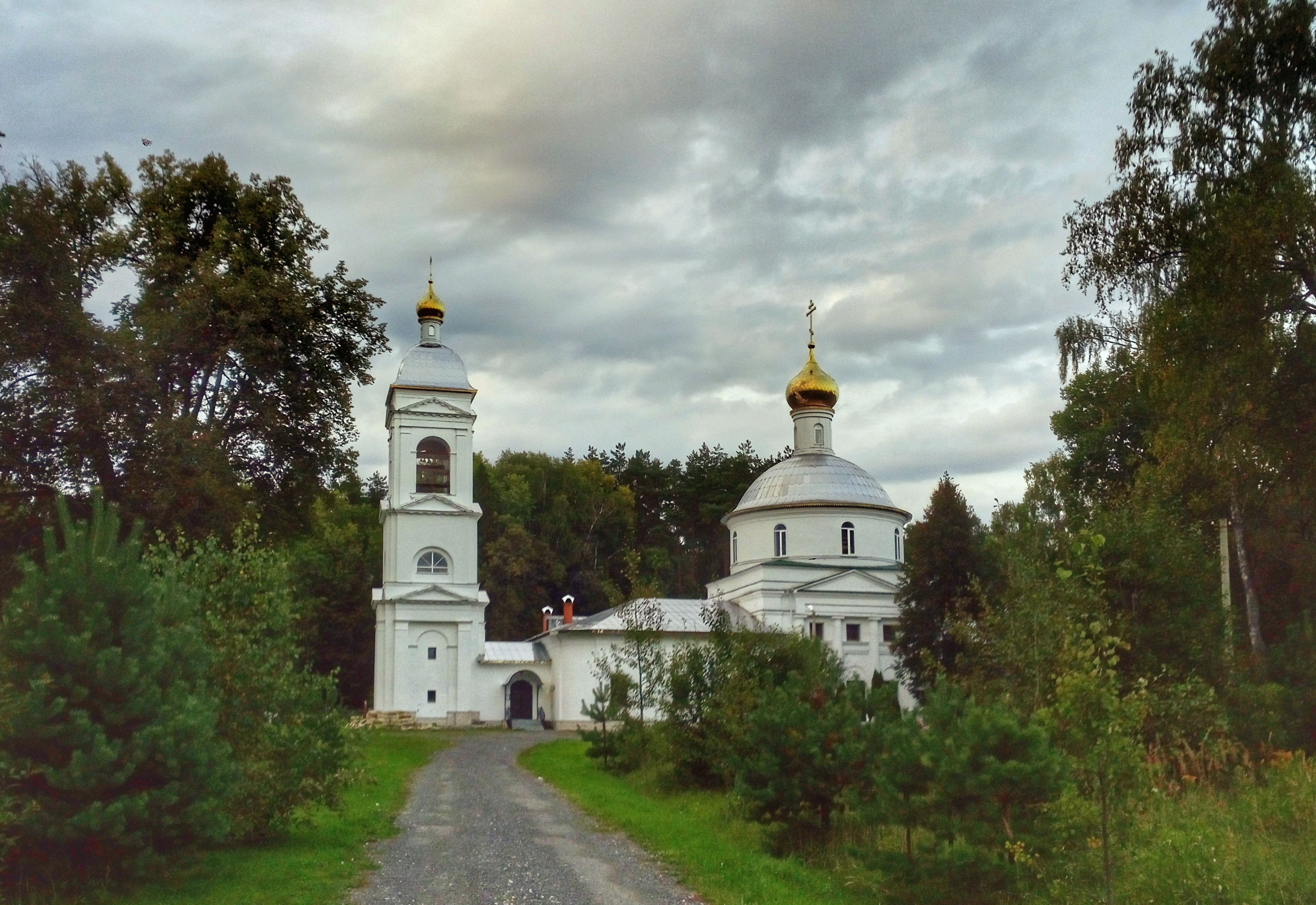 Свято-Андреевский храм.